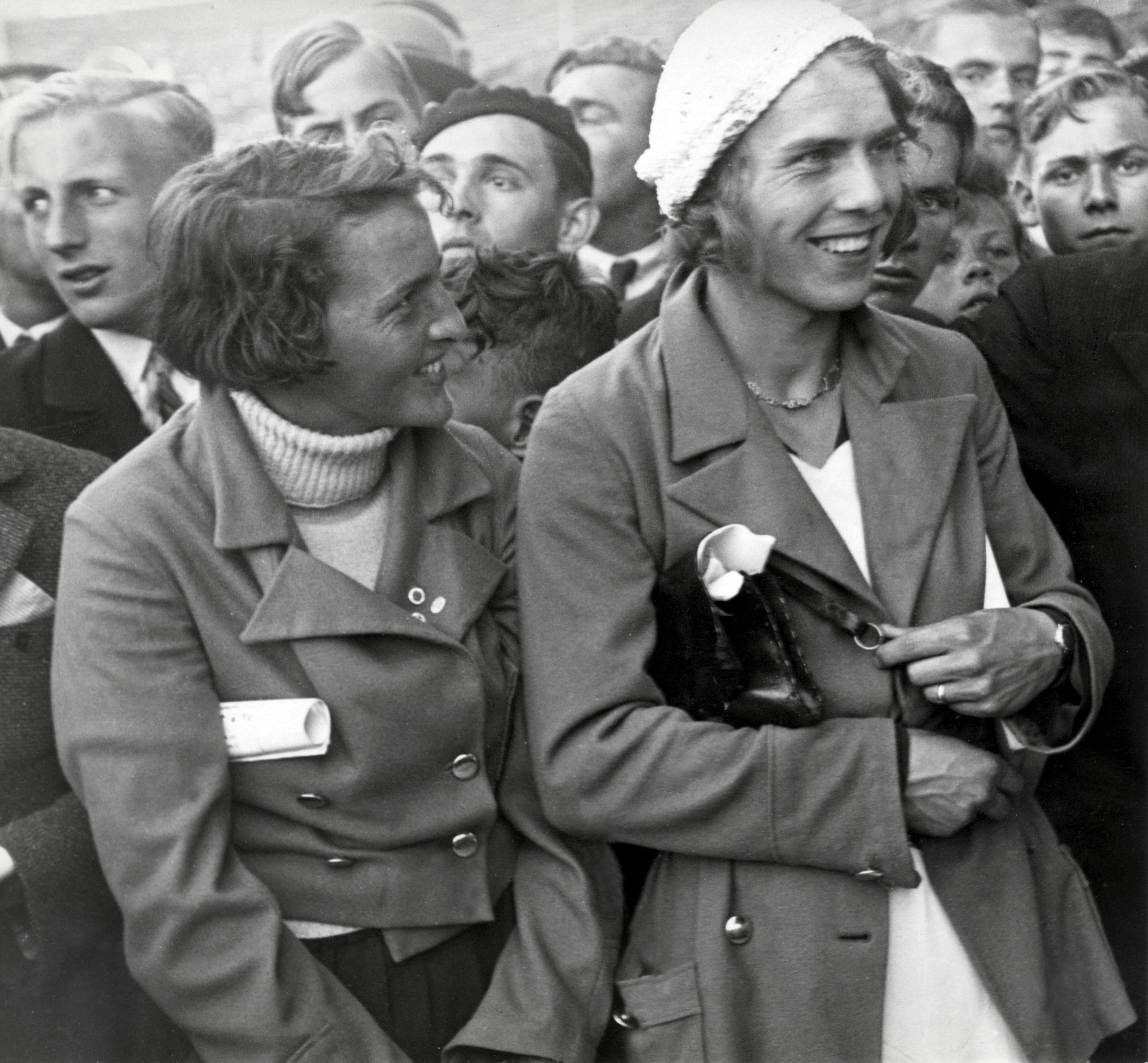 Atletiekwedstrijden. De estafette-loopsters Mej. Du Mee en Tollien Schuurman bij de prijsuitreiking, waarbij zij diverse tropheeën in ontvangst mochten nemen. Amsterdam 1933.